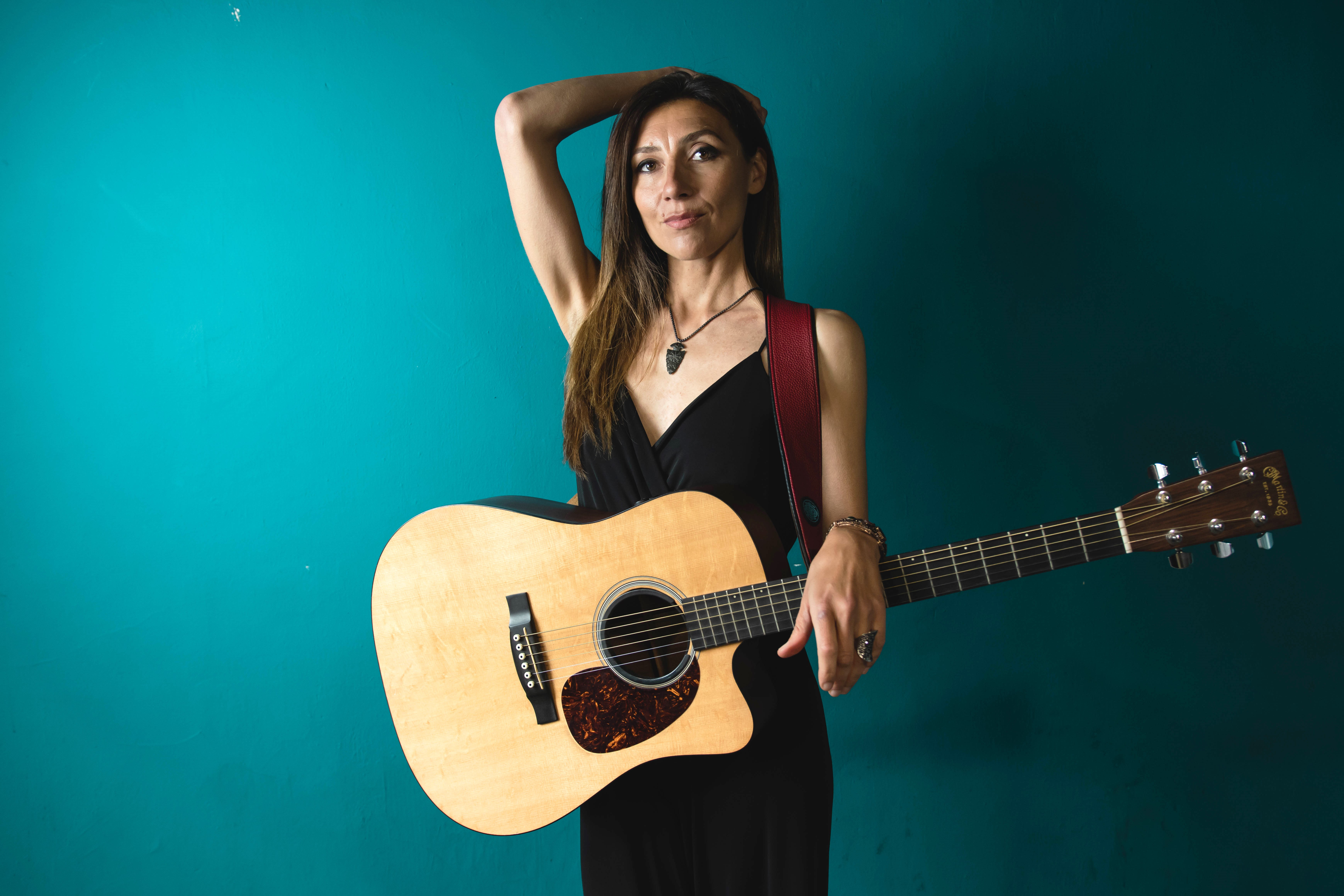 Roberta Di Lorenzo durante lo spettacolo "Moderato Cantabile"